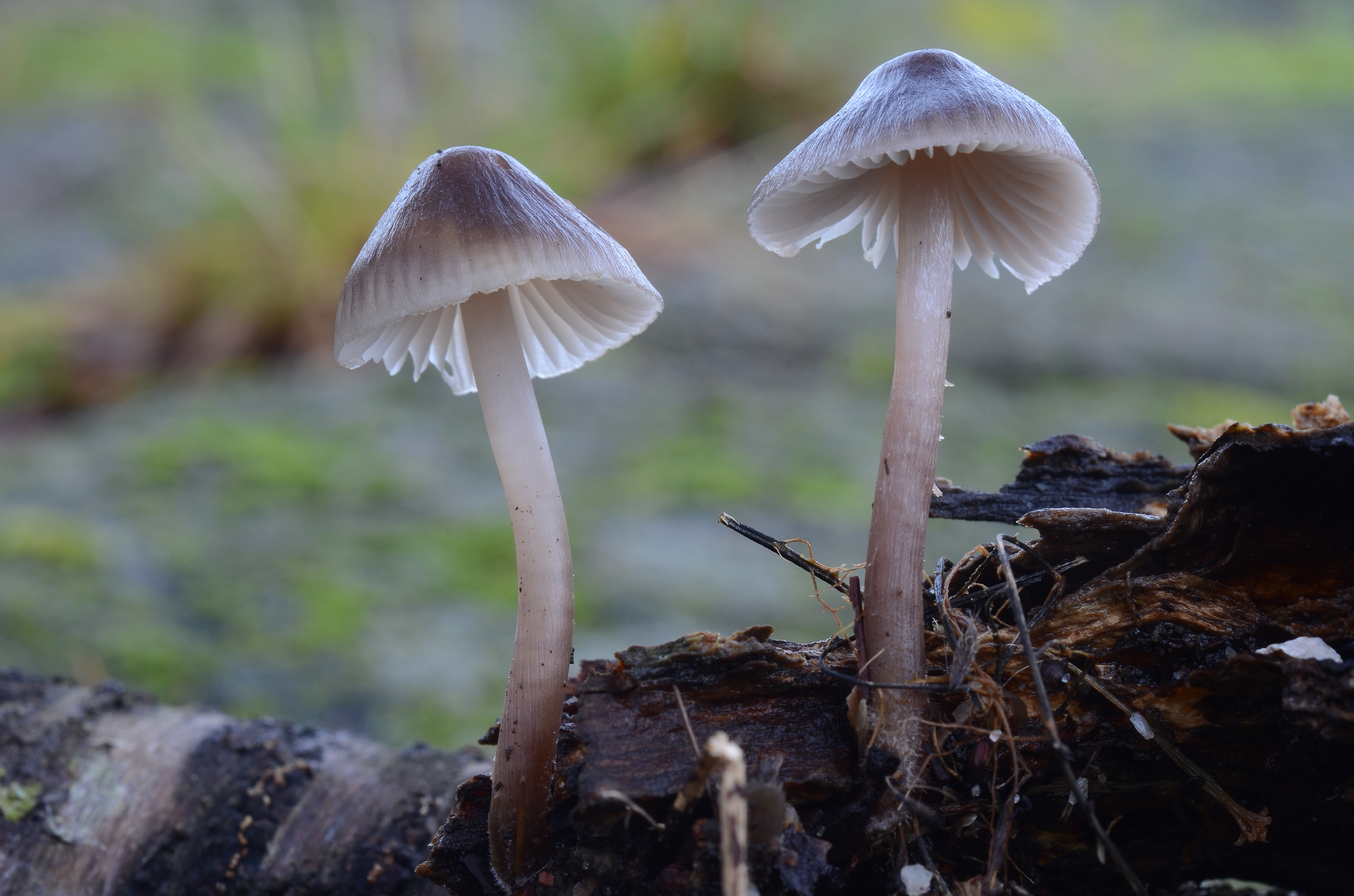 Sopparten flekkskivehette (Mycena maculata).